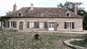 Façade sud de la demeure réalisé au crayon